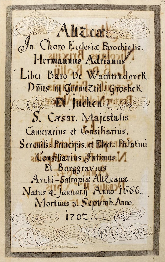 Grabinschrift des kurpfälzischen Burggrafen Hermann Adrian von Wachtendonk (1666-1702) in der Stiftskirche Alzey, aus dem Thesaurus Palatinus